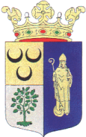 Wapen van Schijndel.